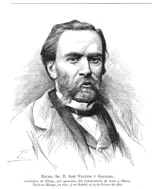 «Excmo. Sr. D. José Vallejo y Galeazo», en la revista española La Ilustración Española y Americana.